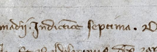 Indictione septima Archivio Pietro Pensa, Pergamene 4, 1